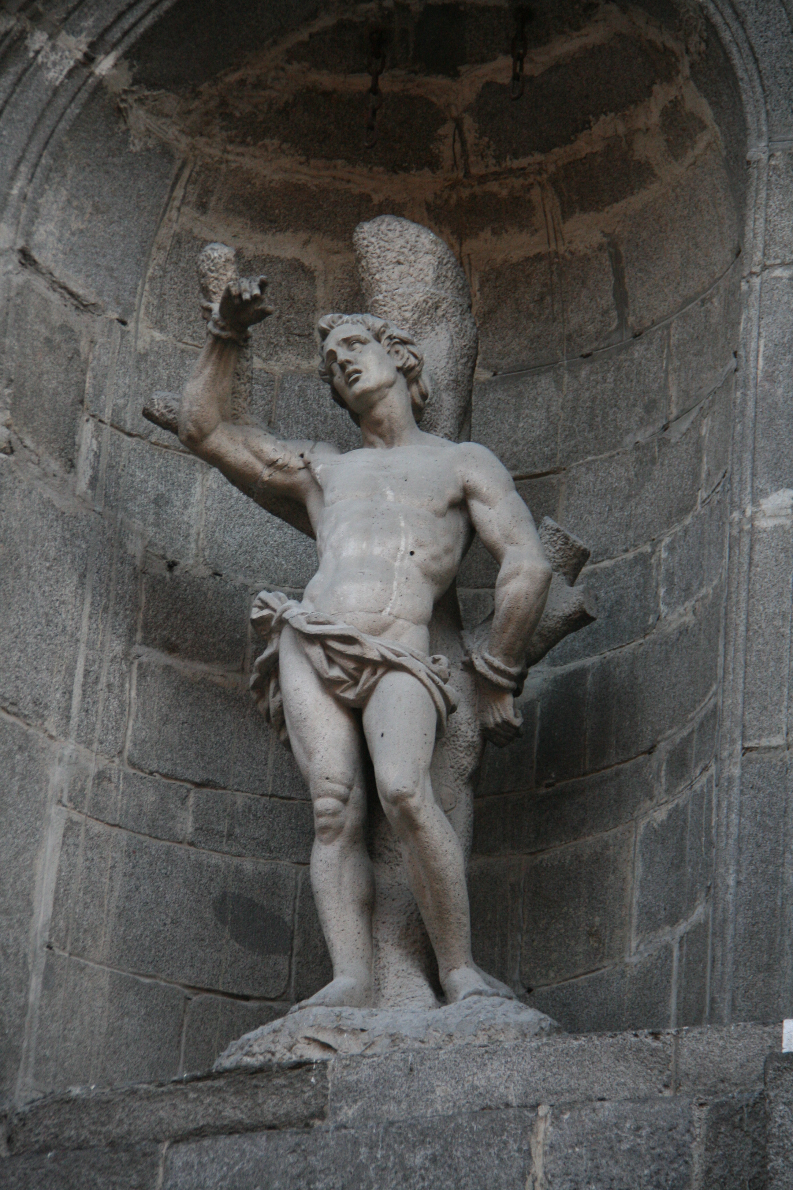 Figura de San Sebastián